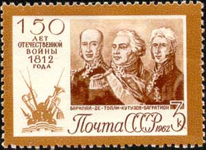 Почтовая марка СССР - 150 лет Отечественной войны 1812 года - 3 коп